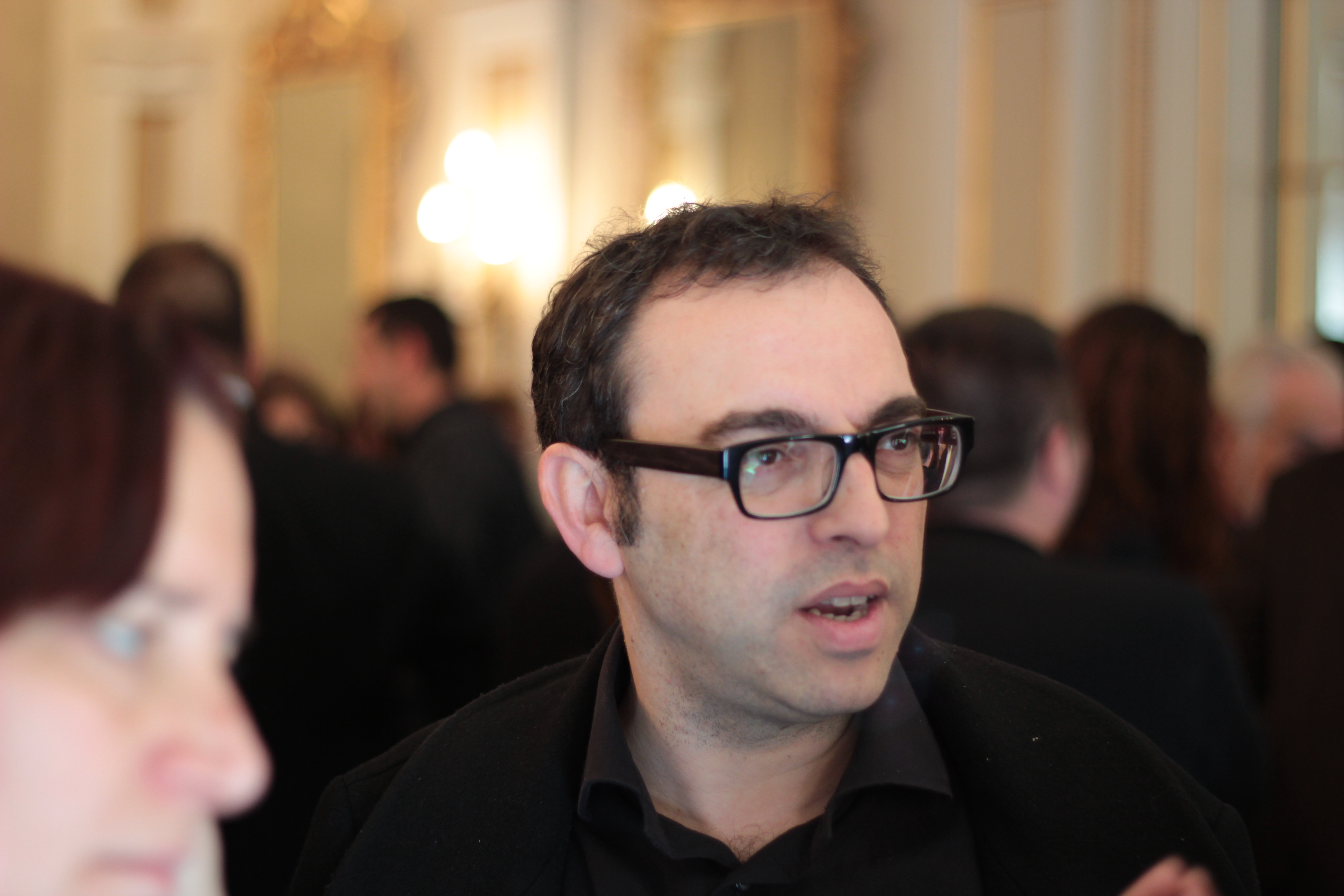 Sergi Belbel a l'acte de presentació dels nominats dels IV premis Gaudí de Cinema Sergi Belbel in the event of presentation of the nominees of the IV Gaudí Awards